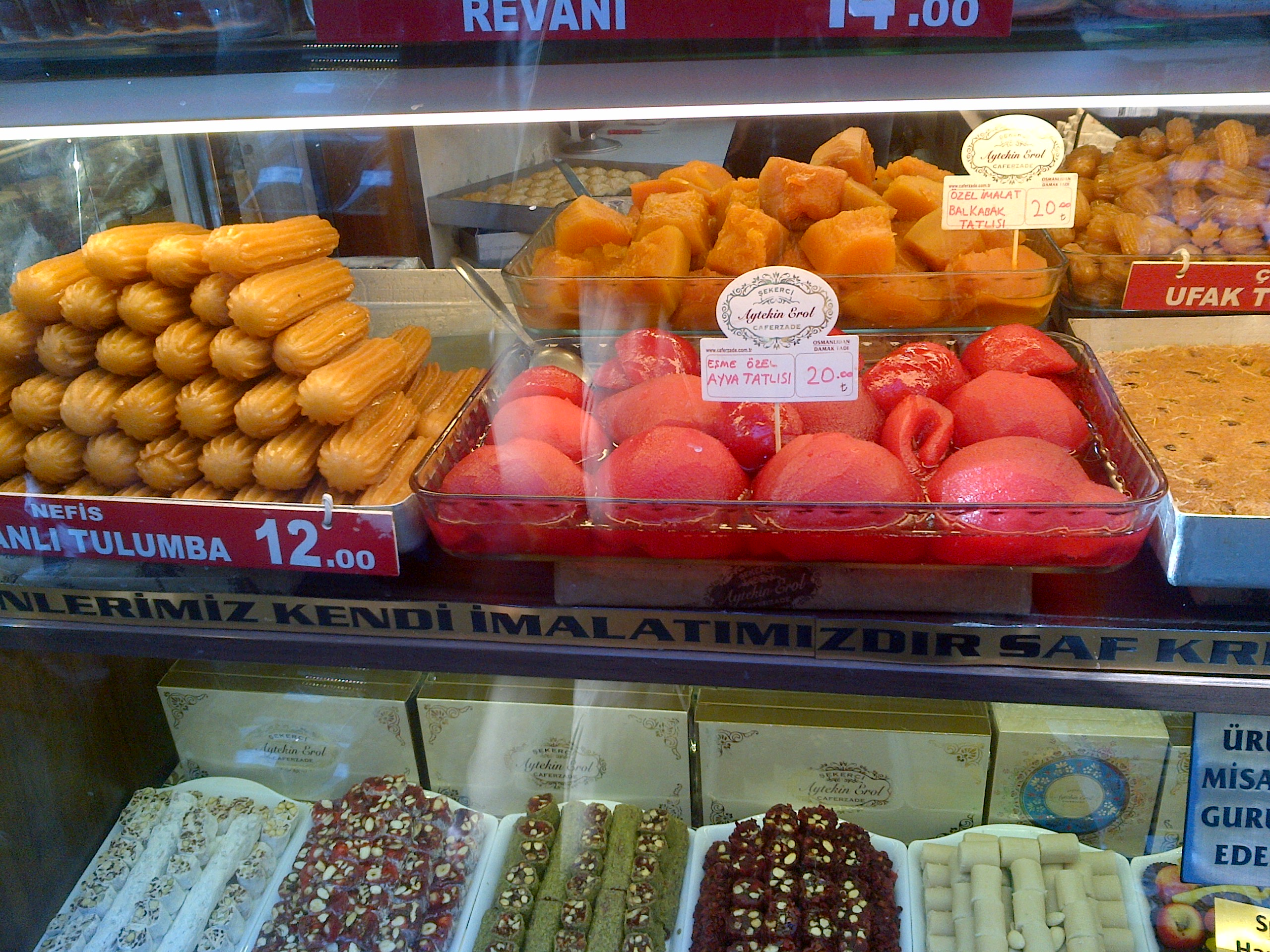 Tulumba, lokum, marzipan, kabak y ayva tatlısı en la vitrina de Caferzade, dulceria ("tatlıcı") tradicional en el historico Mercado de Kadıköy, Estambul.